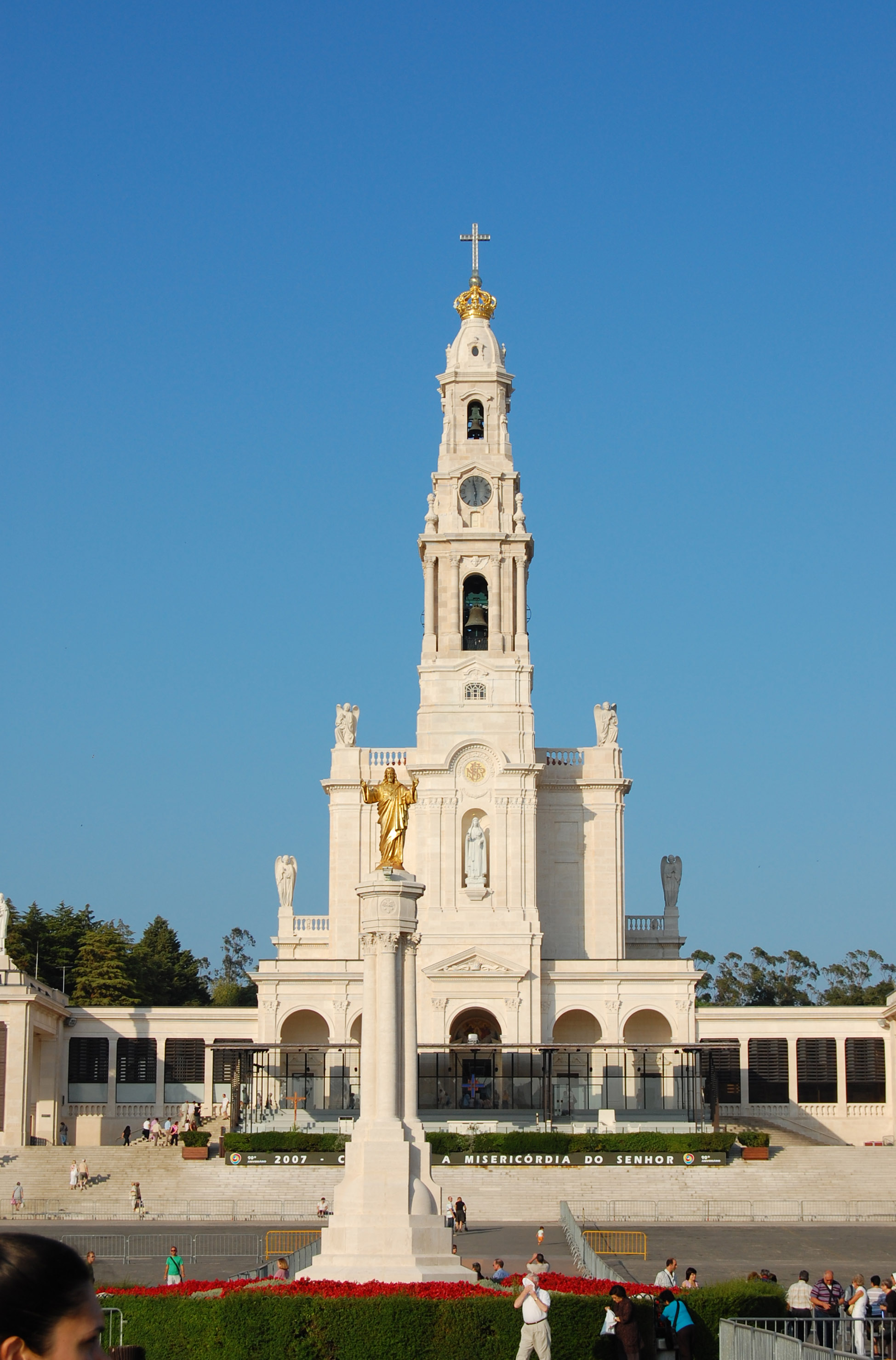 Santuario di Fatima